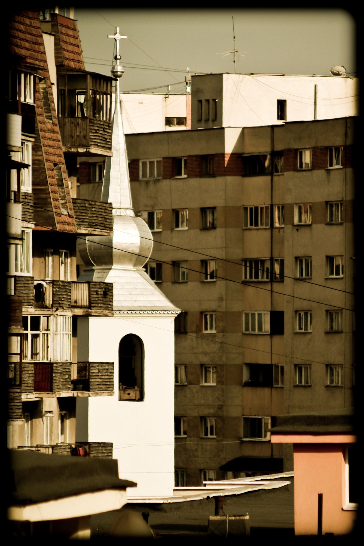 Csíkszereda Szent Kereszt templom 01